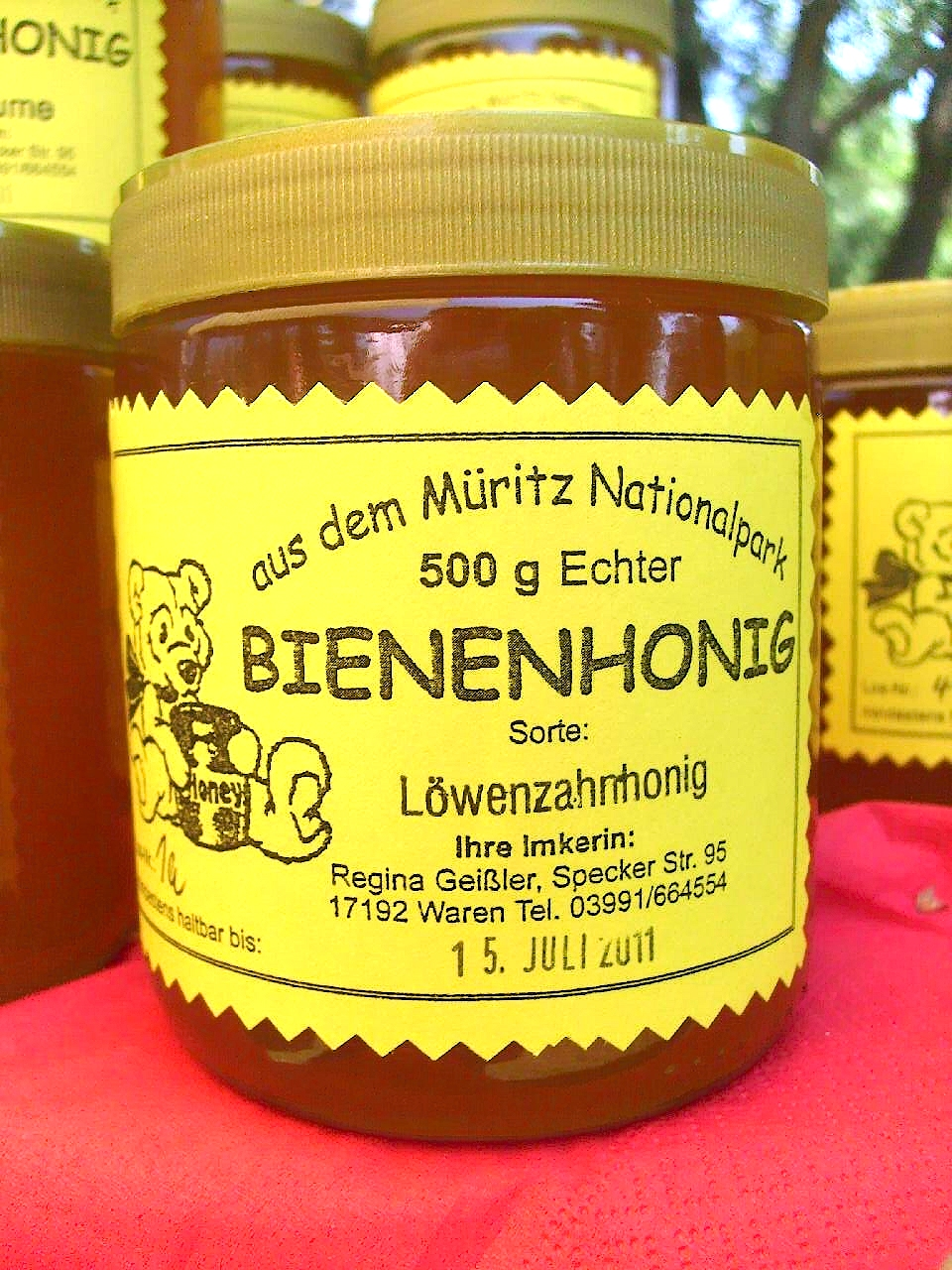 Löwenzahnhonig-Angebot beim Direktverkauf von Honig (hier von einer Imkerin in Mecklenburg-Vorpommern, Deutschland). Der Honig stammt von Löwenzahnblütentracht von Löwenzahnpflanzen aus dem Müritz-Nationalpark im Süden Meckenburg-Vorpommerns.